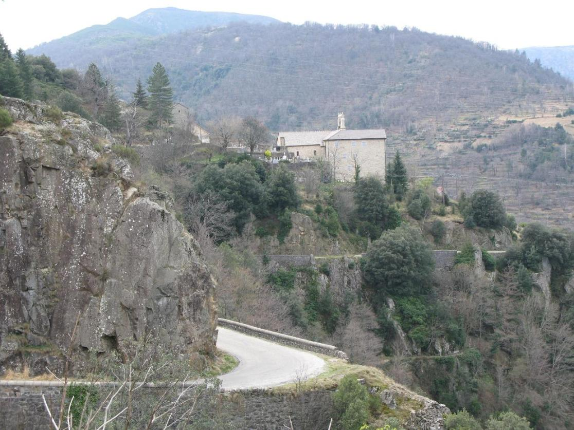 Village de Sainte-Marguerite-Lafigère